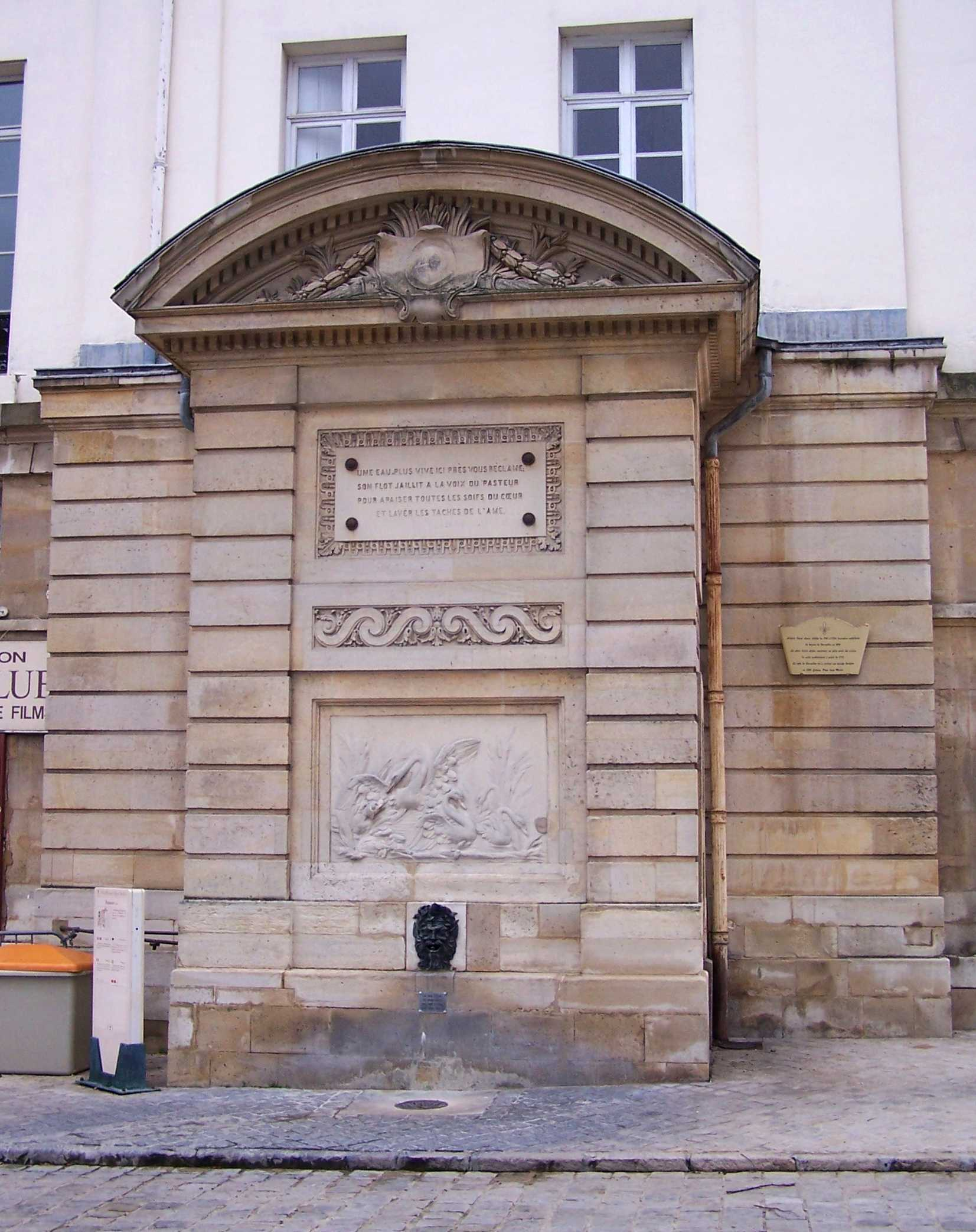 Fontaine Saint-Louis, place Saint-Louis (cathédrale) à Versailles (Yvelines, France)